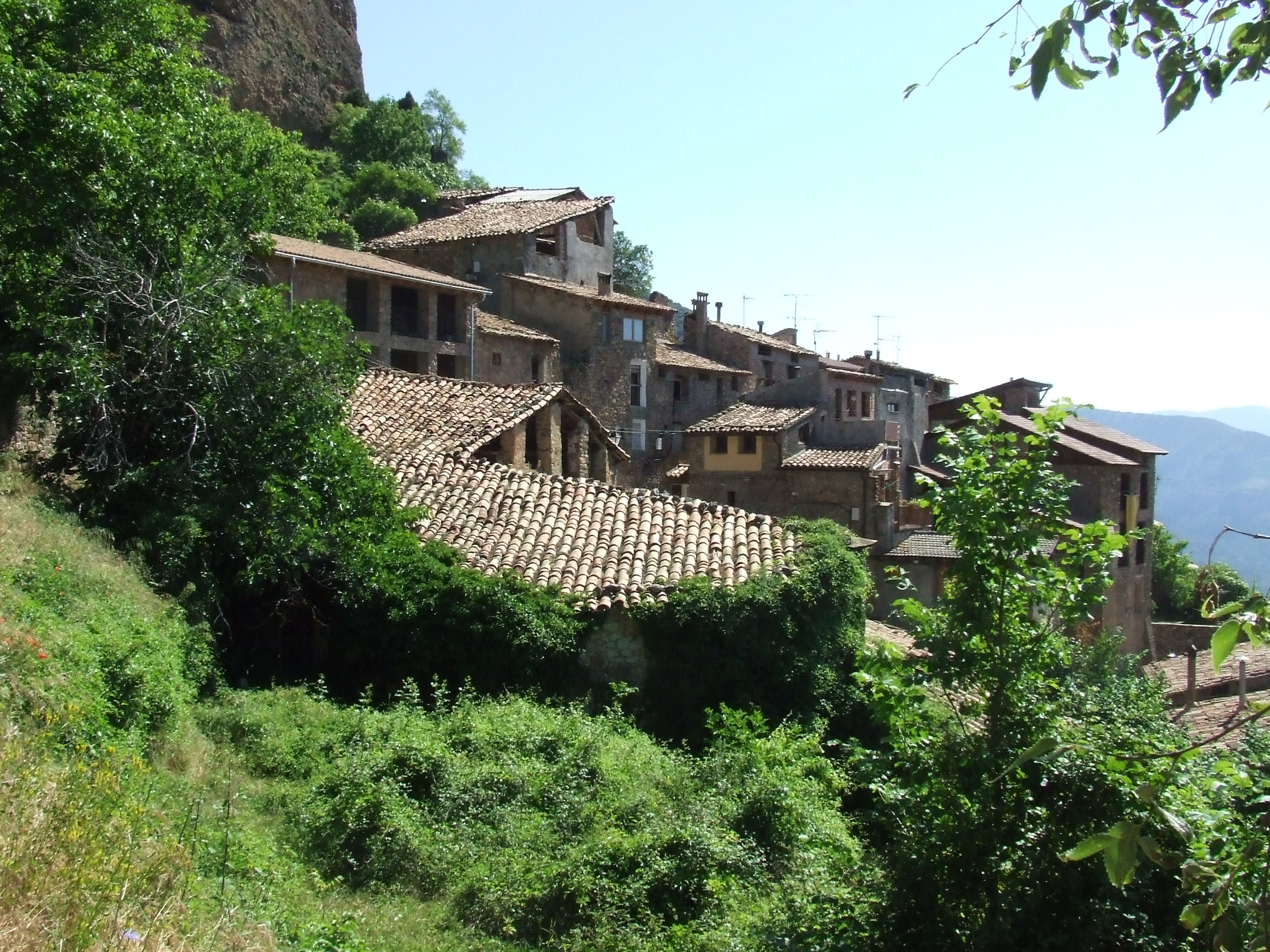 Serradell des de ponent (Toralla i Serradell, Coca de Dalt, Pallars Jussà)